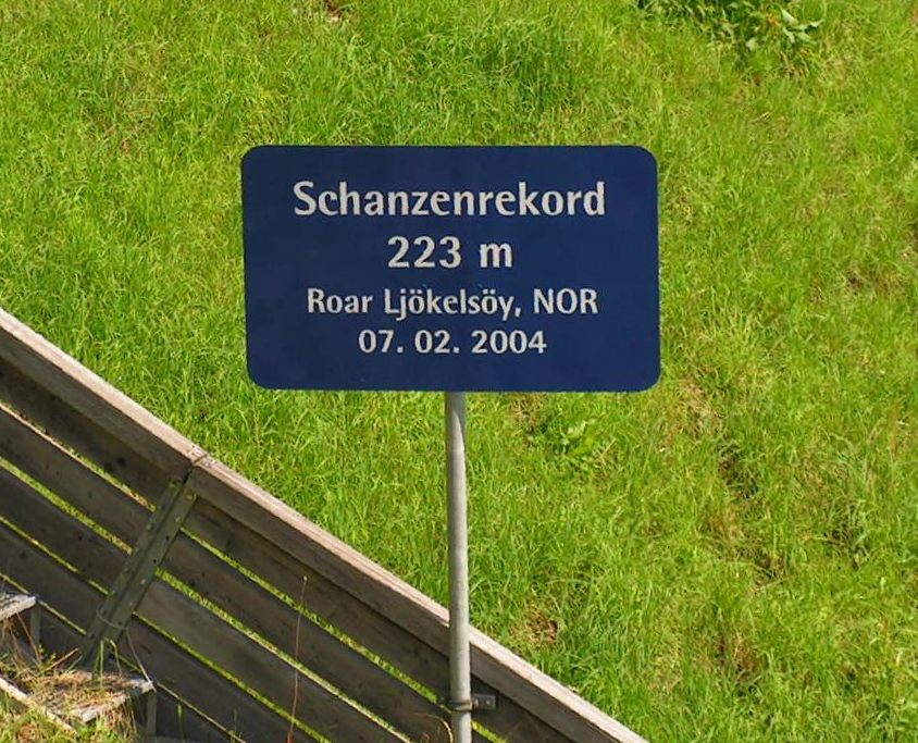 Heini-Klopfer-Skiflugschanze